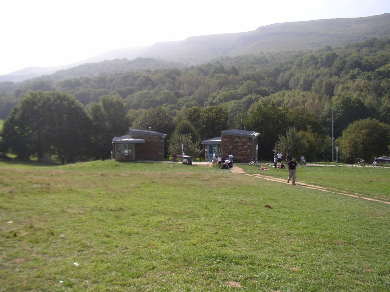 Albergue de Triacastela - LugoTriacastela